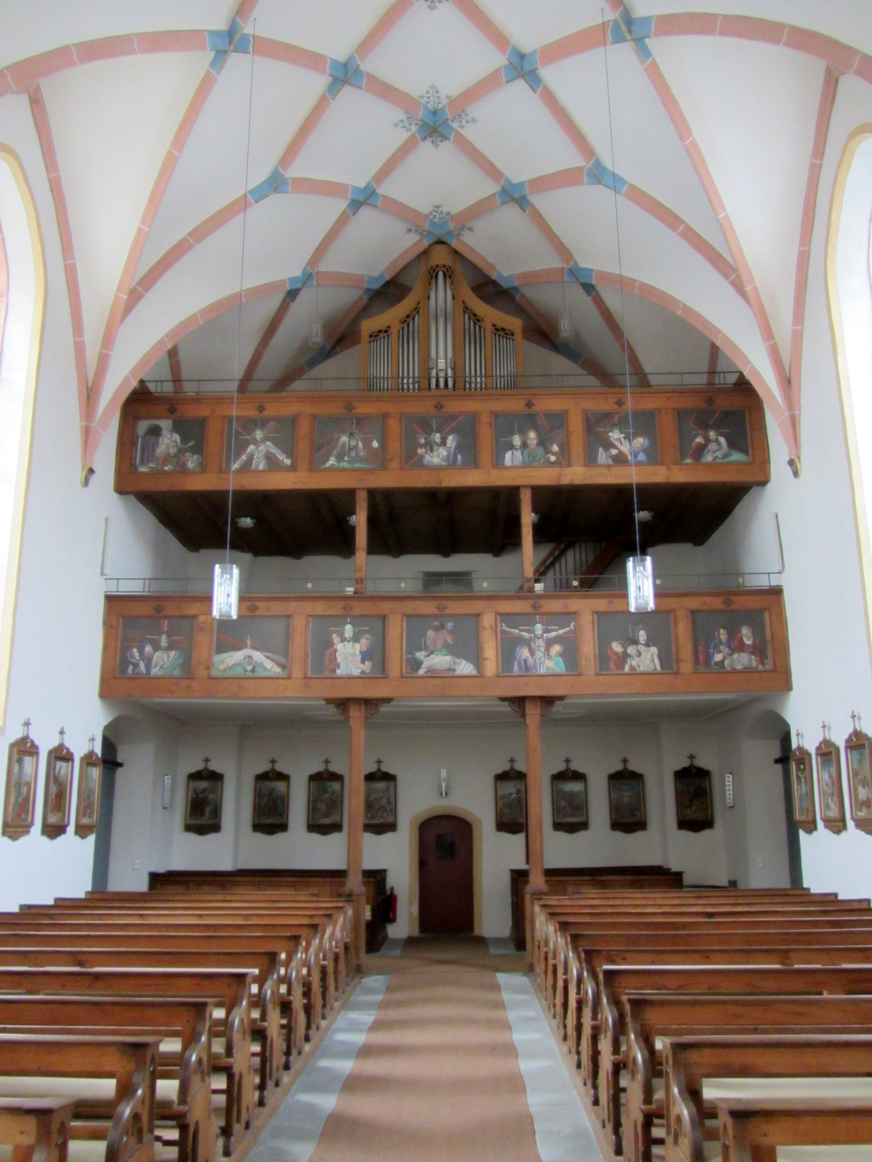 St. Magnus (Unterzeil) - Empore u. Orgel